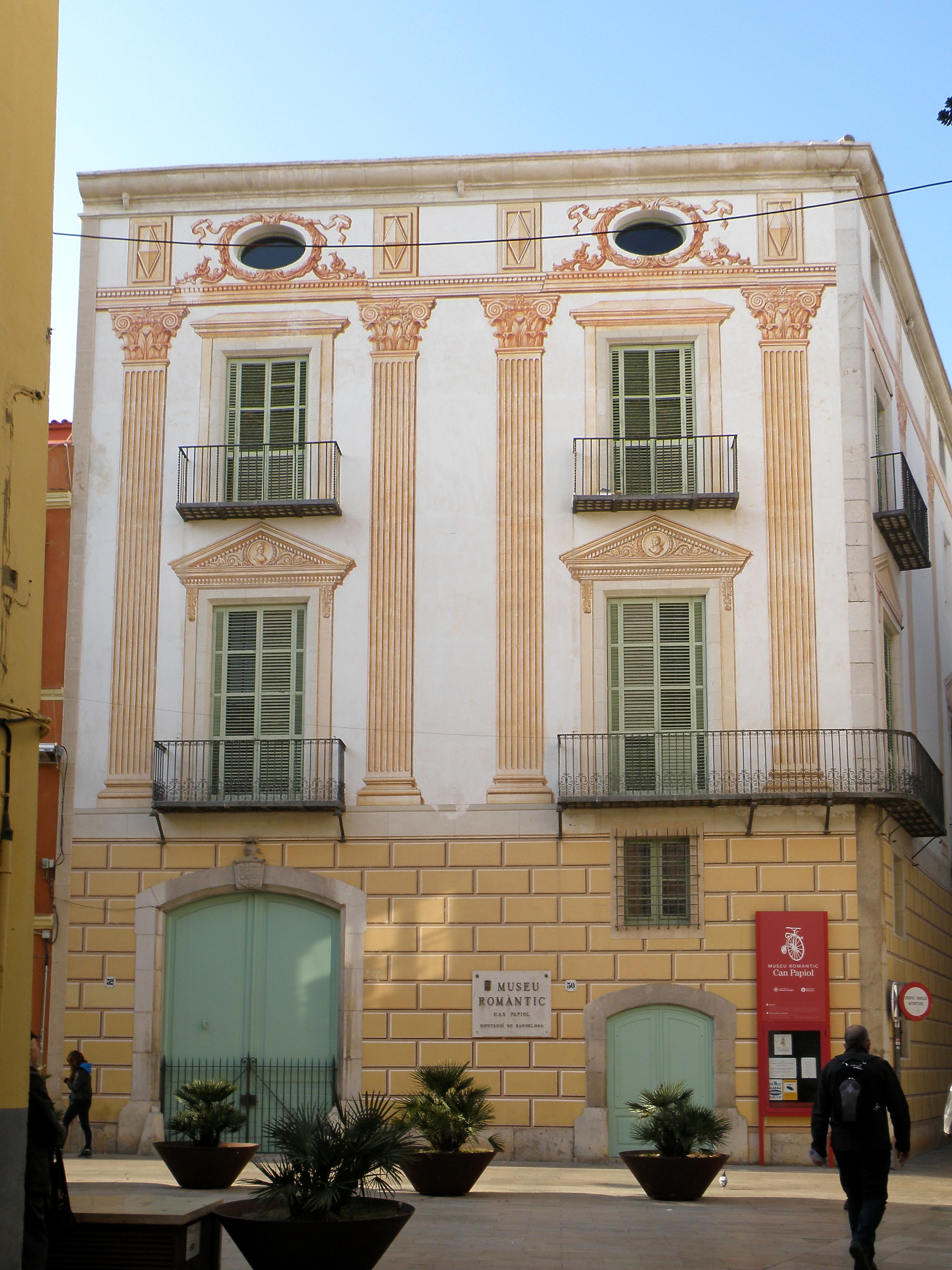 Museu Romàntic Can Papiol de Vilanova i la Geltrú